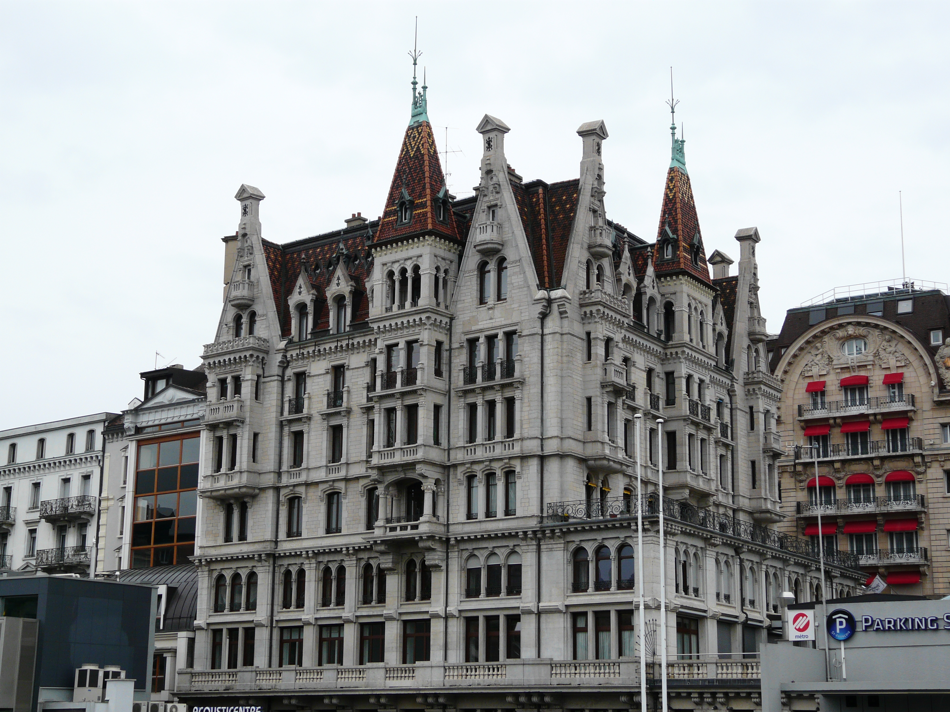 Дом Мерсье, Лозанна